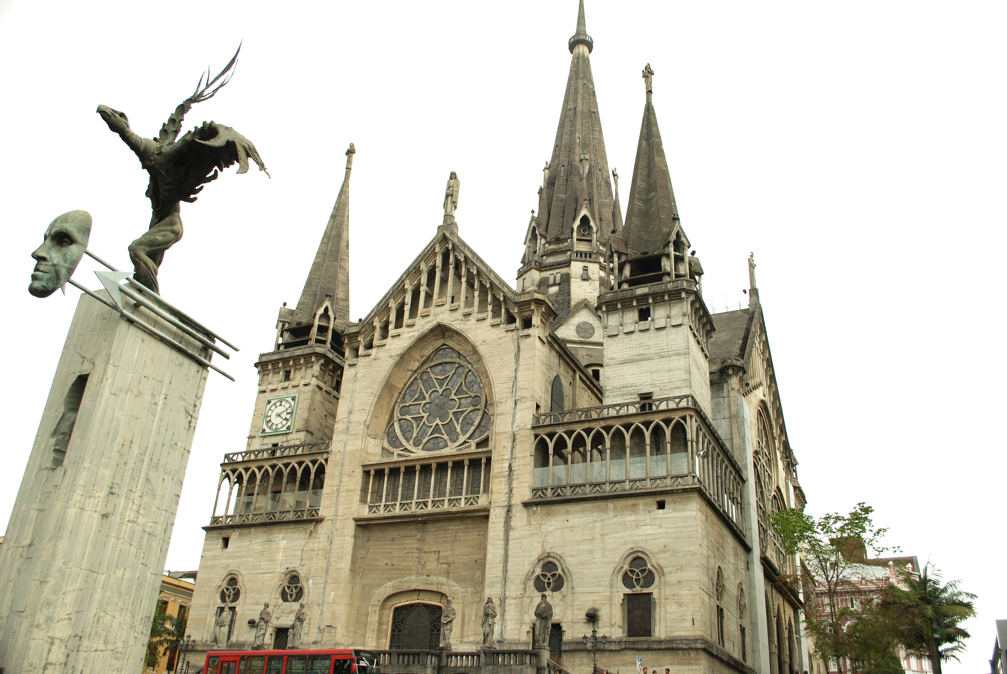 Vista de la catedral desde la plaza de bolivar, la compone ademas otro monumento representativo de la cuidad